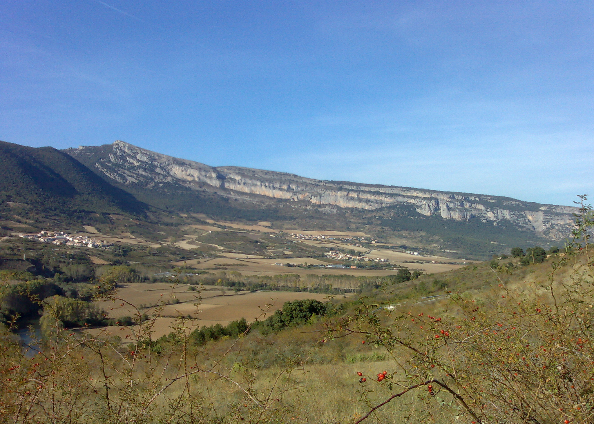 Etxauri ibarraren ikuspegia.